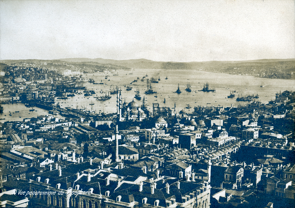 Vue panoramique sur le Bosphore au XIXème siècle